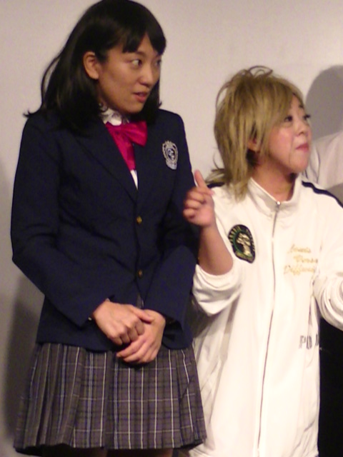 日本エレキテル連合 (2018年9月)